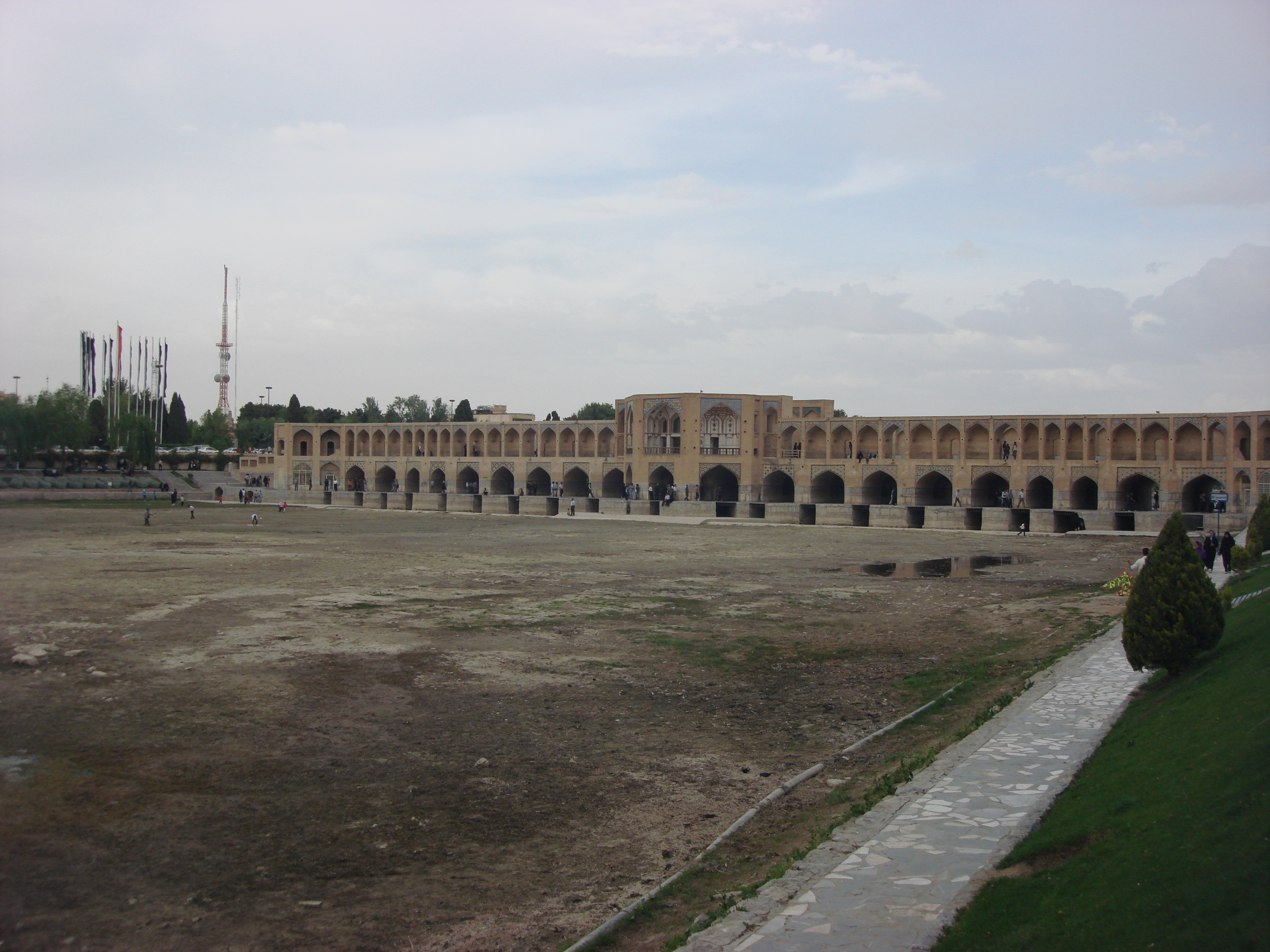 زاینده رود بی آب